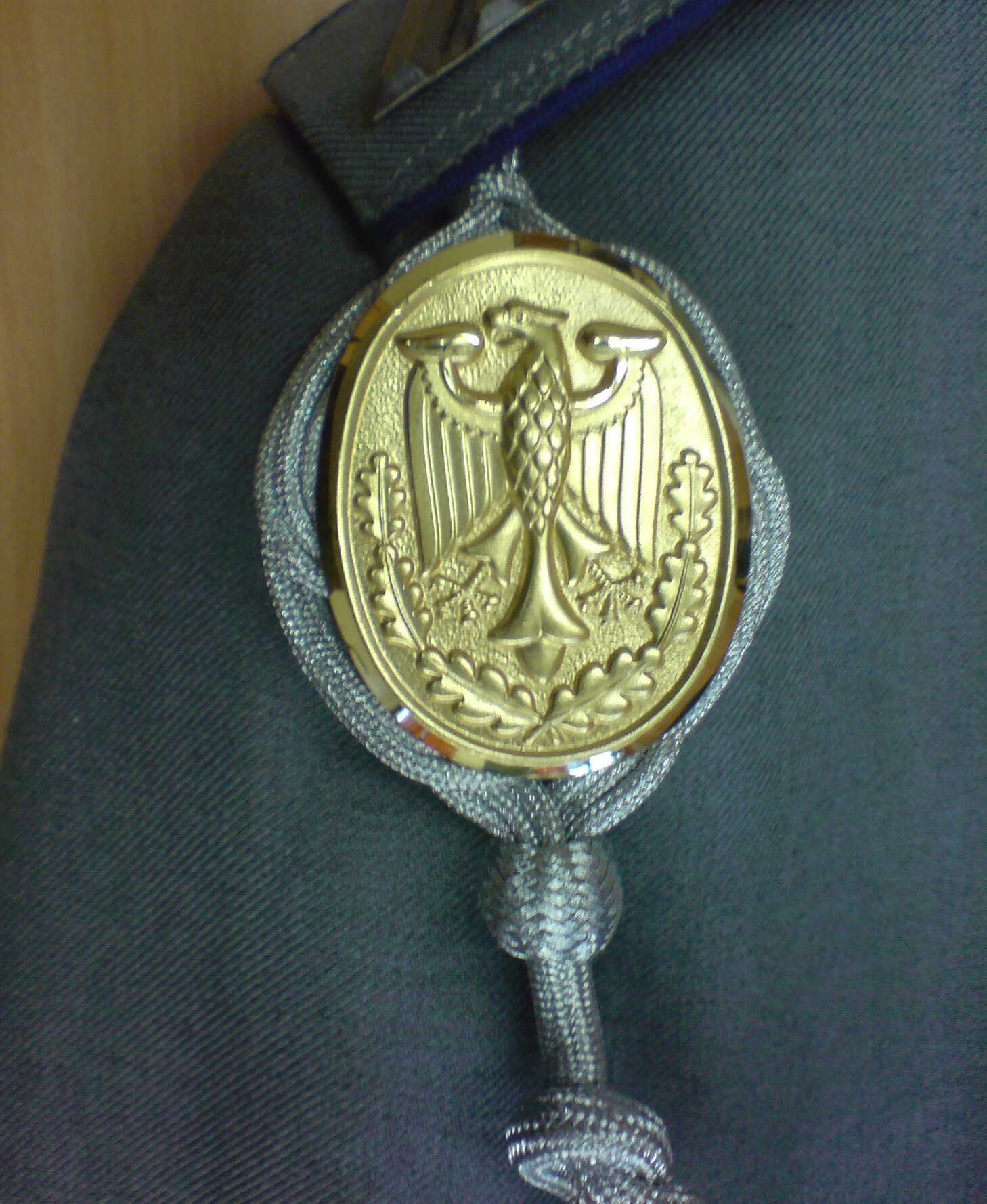 Goldene Plakette der Schützenschnur